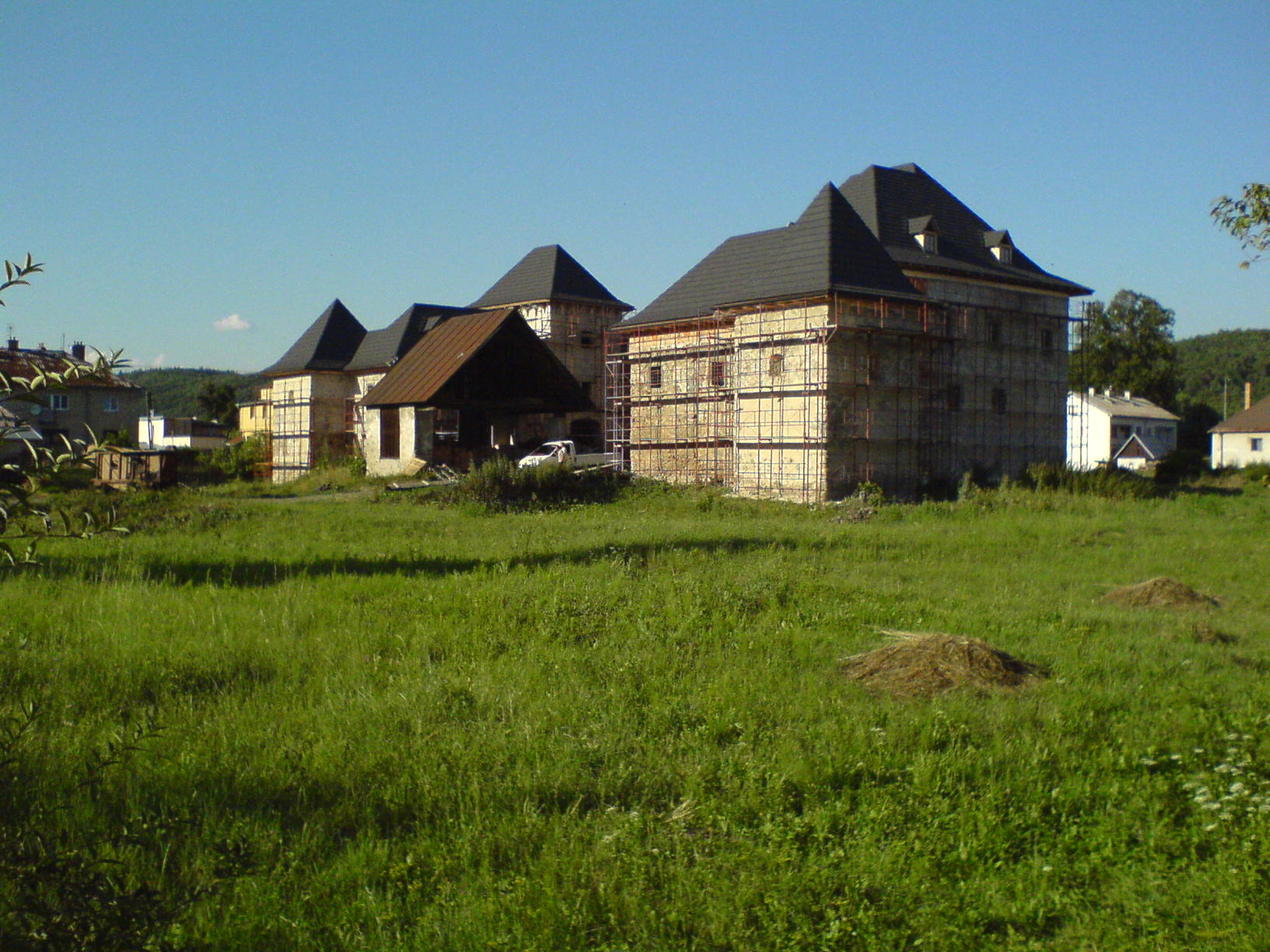 Vodný hrad, Hronsek, okres Banská Bystrica